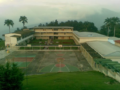 Seminario Mayor Sagrado Corazón de Jesús de Trujillo